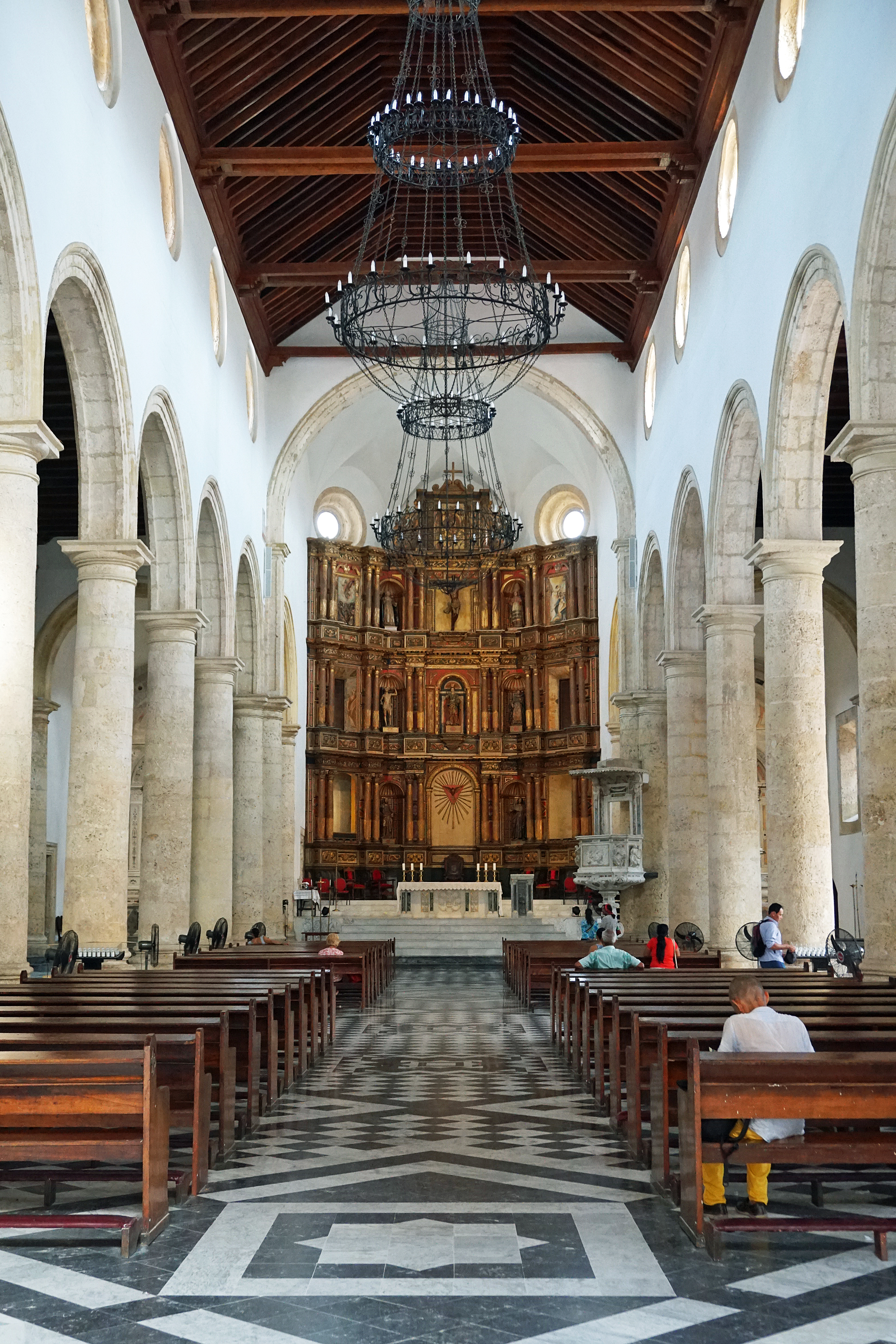 Nave central de la Catedral Santa Catalina de Alejandria, Cartagena de Indias